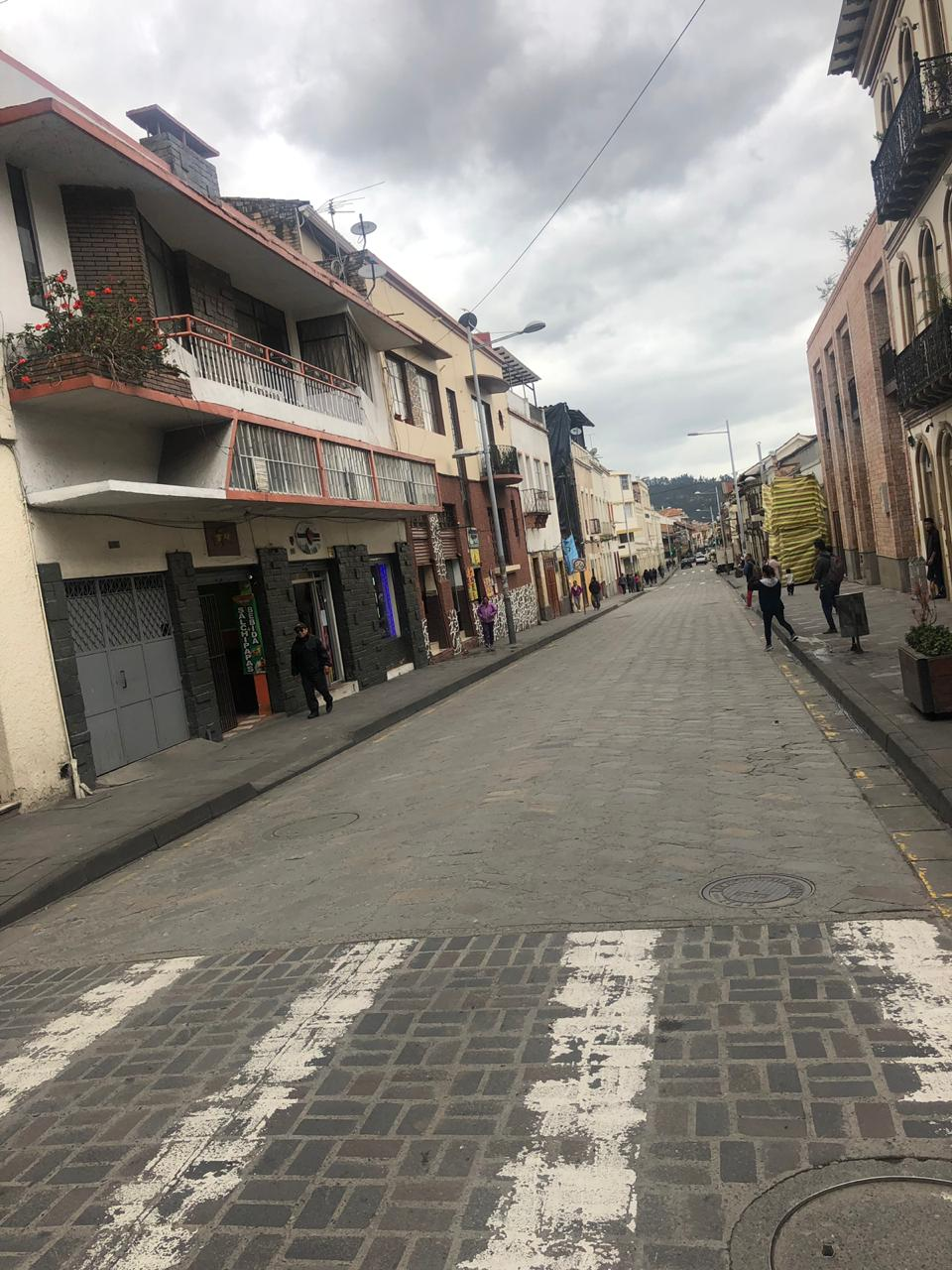 Calle Larga - Centro Historico Cuenca